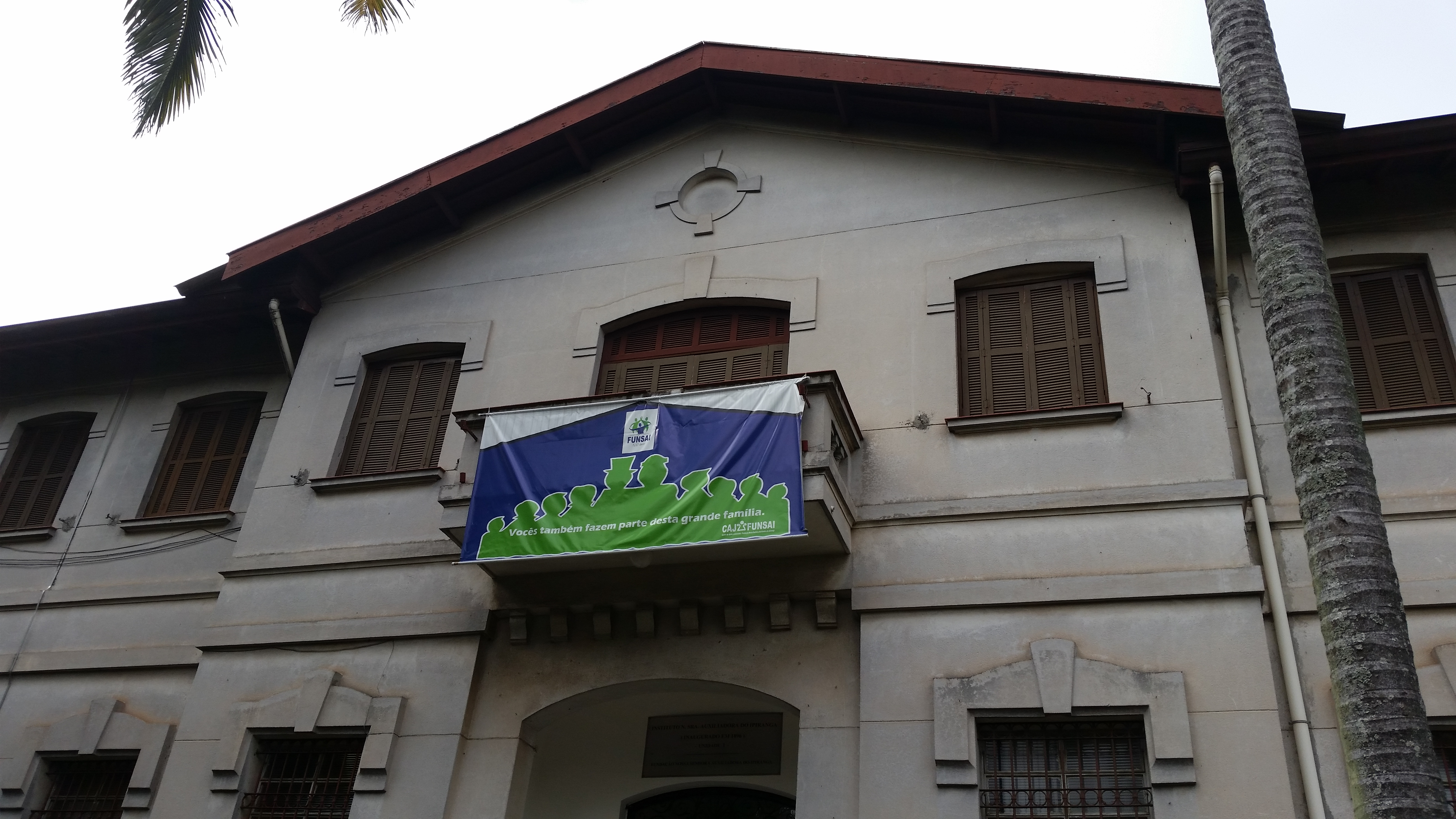 Detalhe das janelas na parte superior da fachada do edifício de 1856.